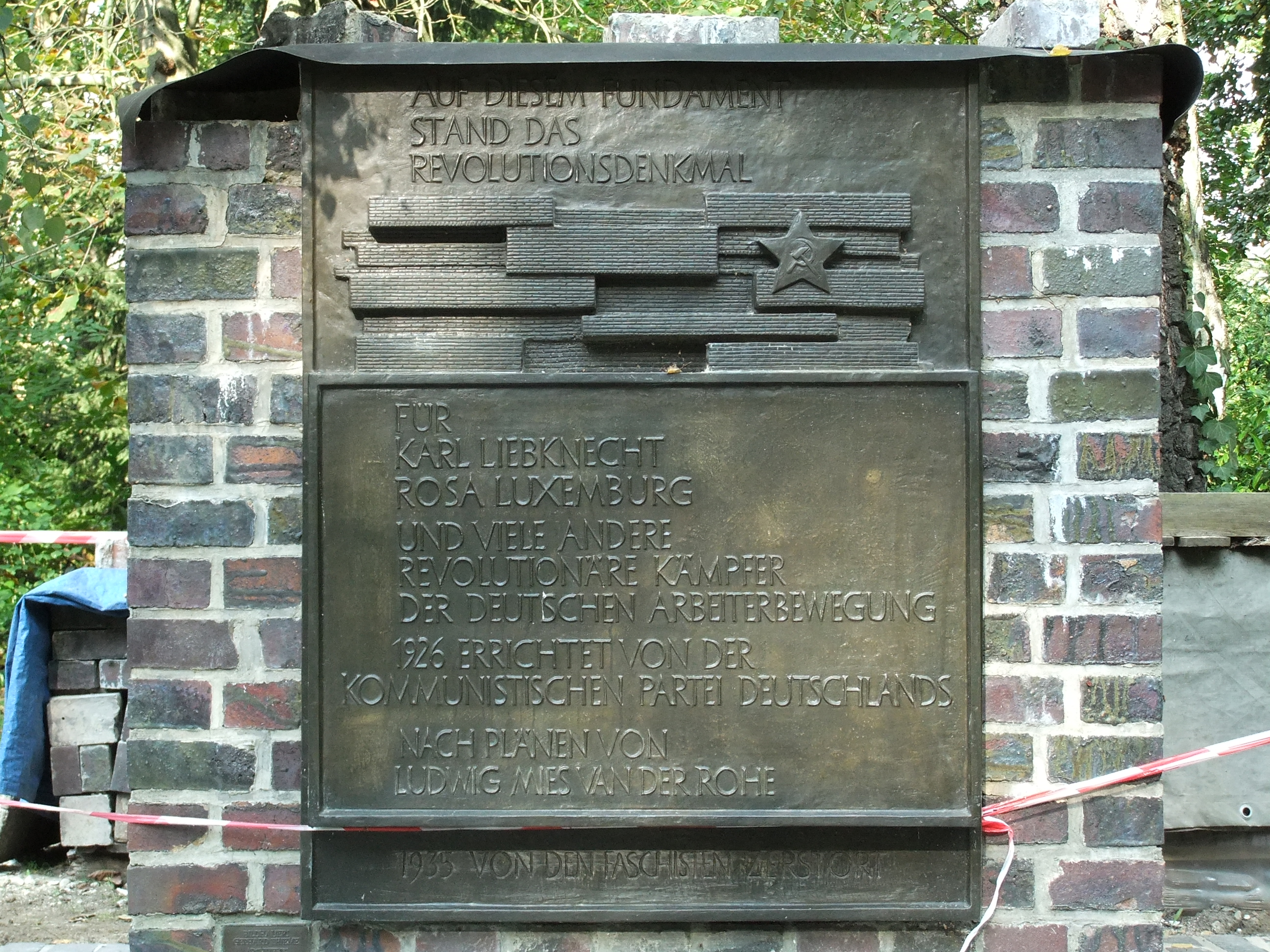 Denkmalliste Berlin 09040283 - Berlin Lichtenberg Gudrunstraße, Erinnerungsmal an das Revolutionsdenkmal von 1926, 1983 von Günter Stahn und Gerhard Thieme auf dem Städtischen Zentralfriedhof (Baudenkmal)